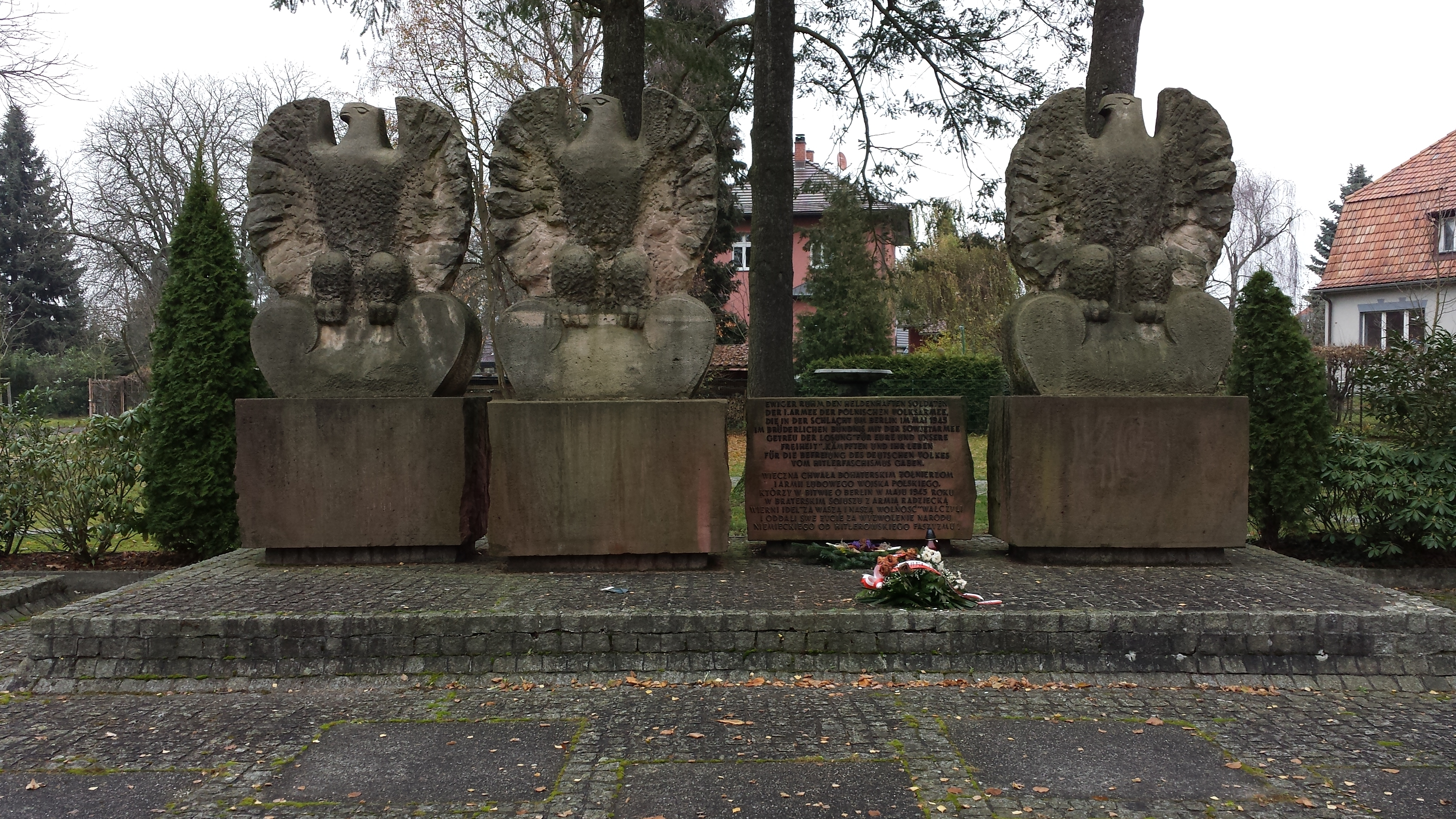 Hohen Neuendorf Polnisches Denkmal